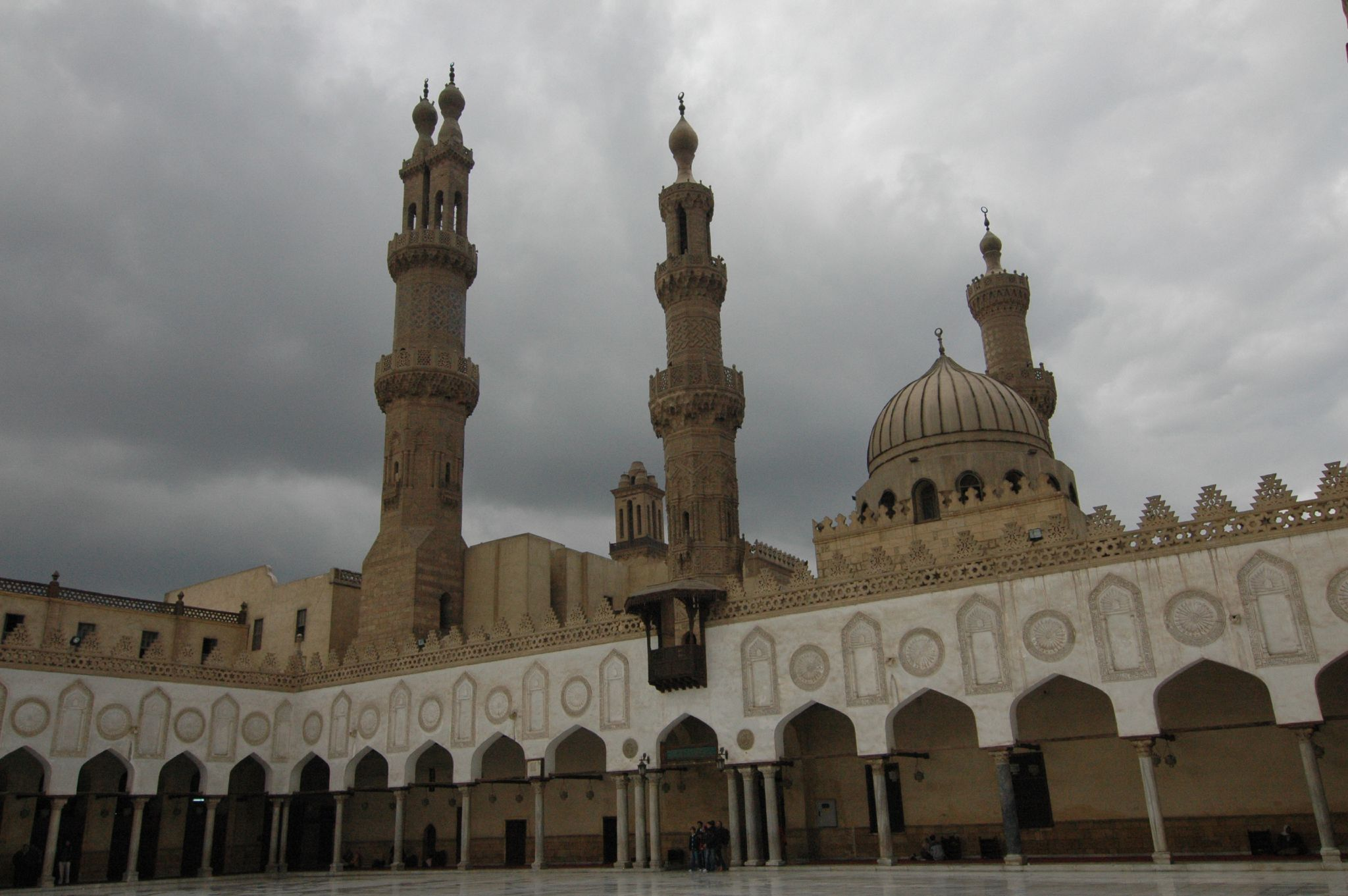 notare la giornata di pioggia (più unica che rara in Egitto)